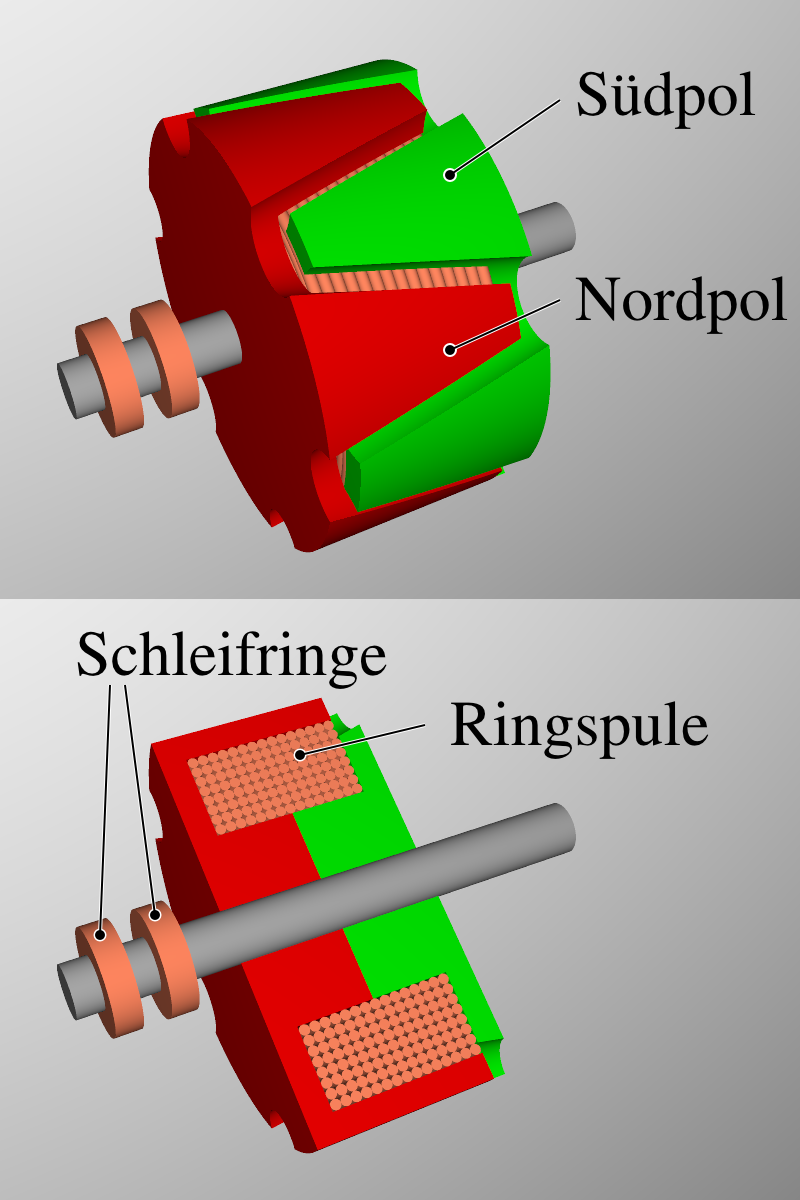 Schenkelpolmaschine